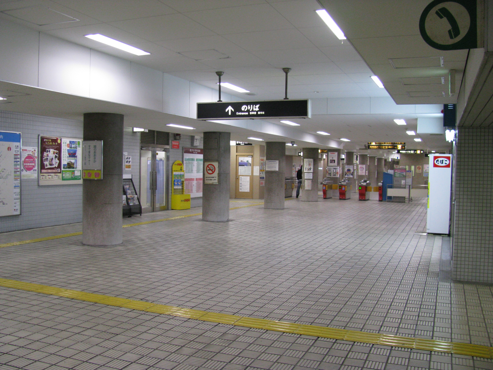 大阪市営地下鉄扇町駅